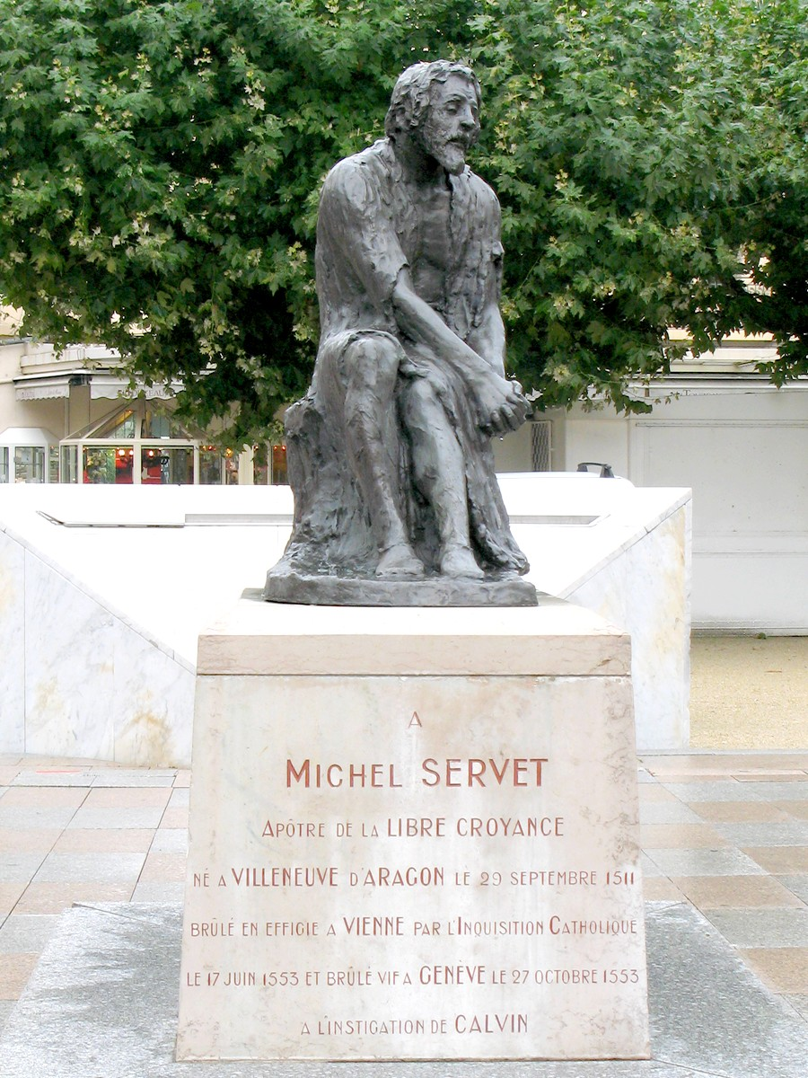 Statue de SERVET Michel, place de la Mairie d'Annemasse (Hte Savoie - France). Œuvre de Clotilde Roch (1861-1923)